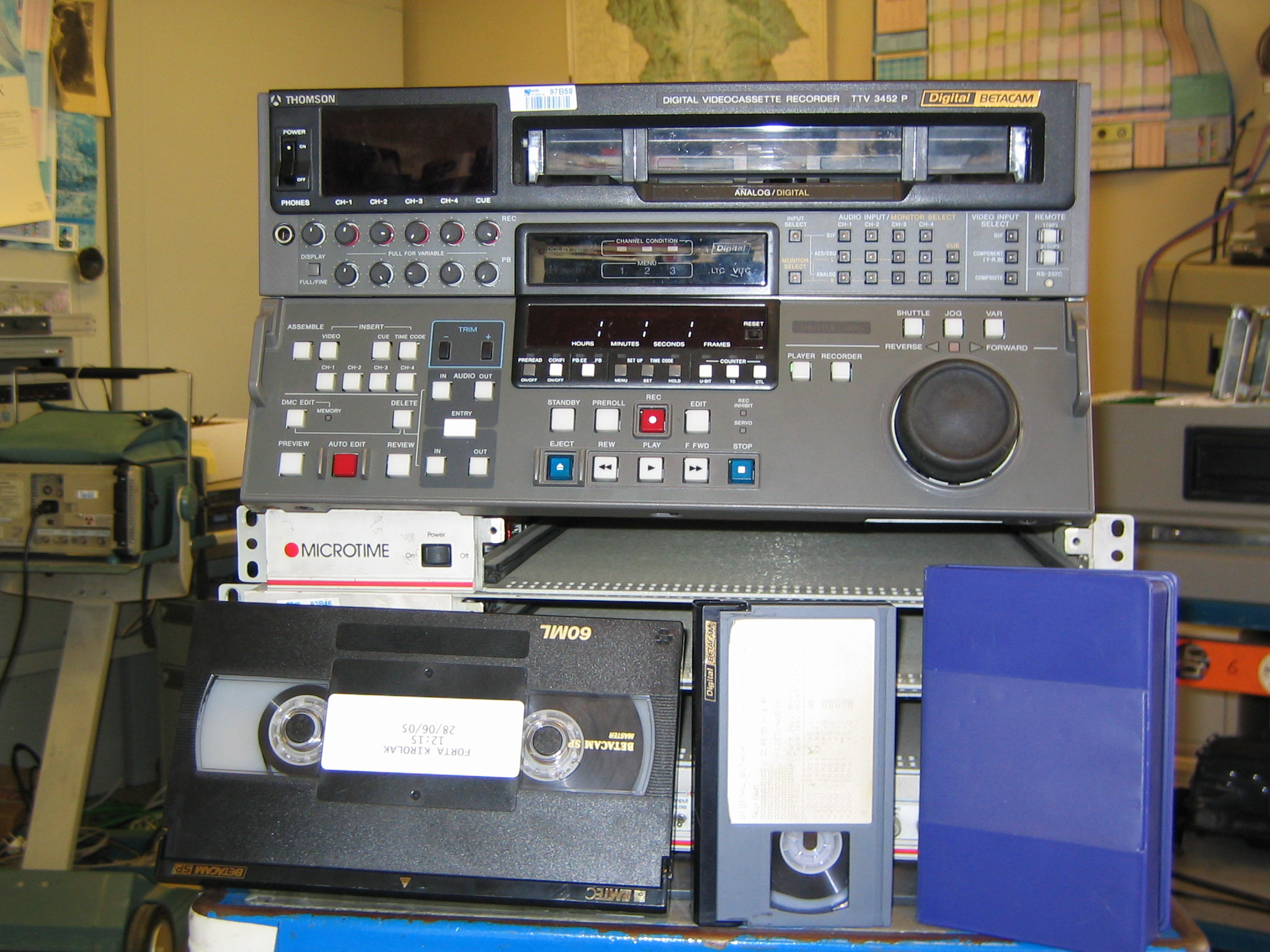 Magnetoscopio TTV3452P de Thomson. Formato Betacam digital.